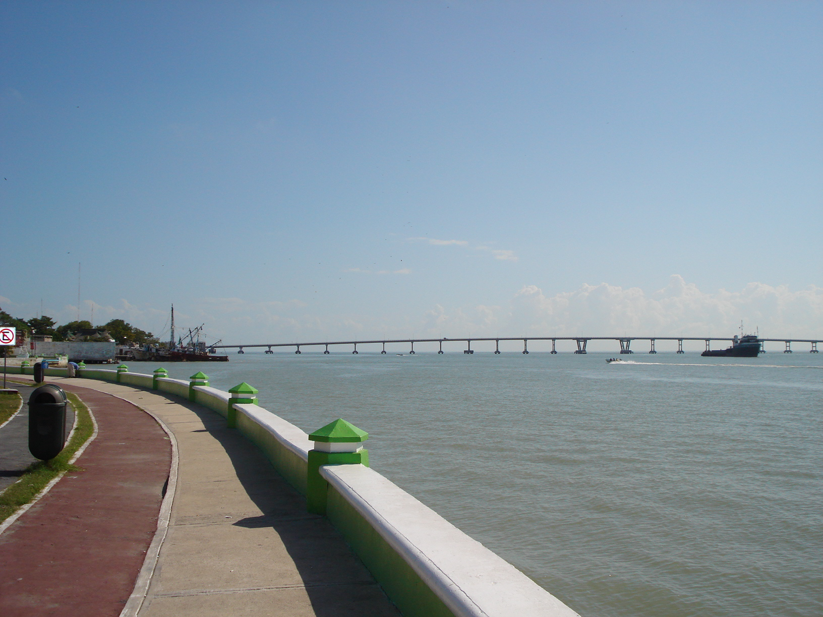 Malecon en Ciudad del Carmen, Campeche